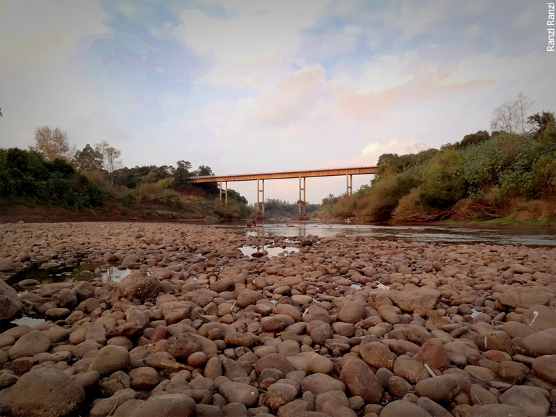 Foto tirada no meio do Rio Forqueta, entre Lajeado e Arroio do Meio, na maior seca desde 1943